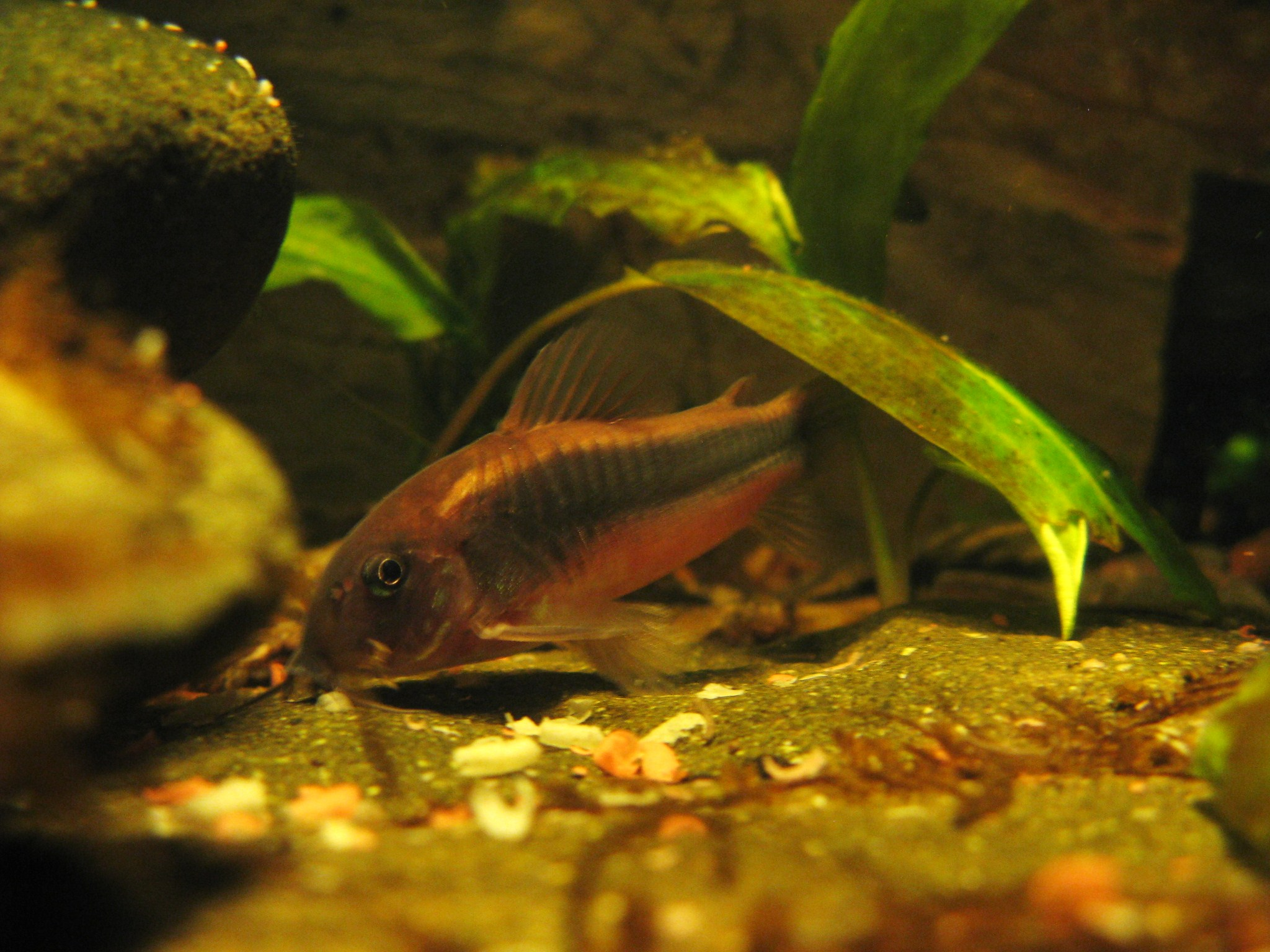 Pancéřníček zelená